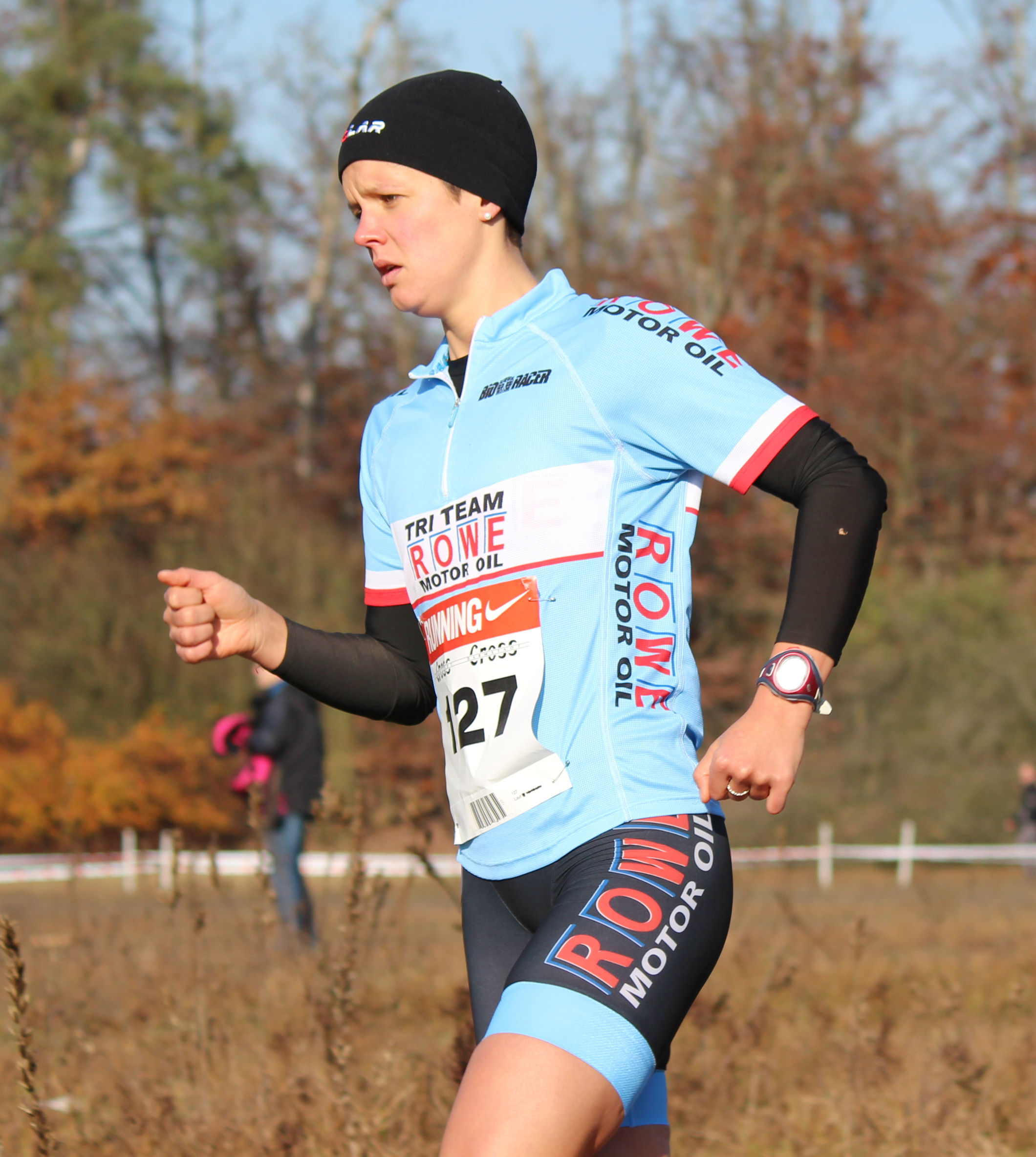 Carina Brechters